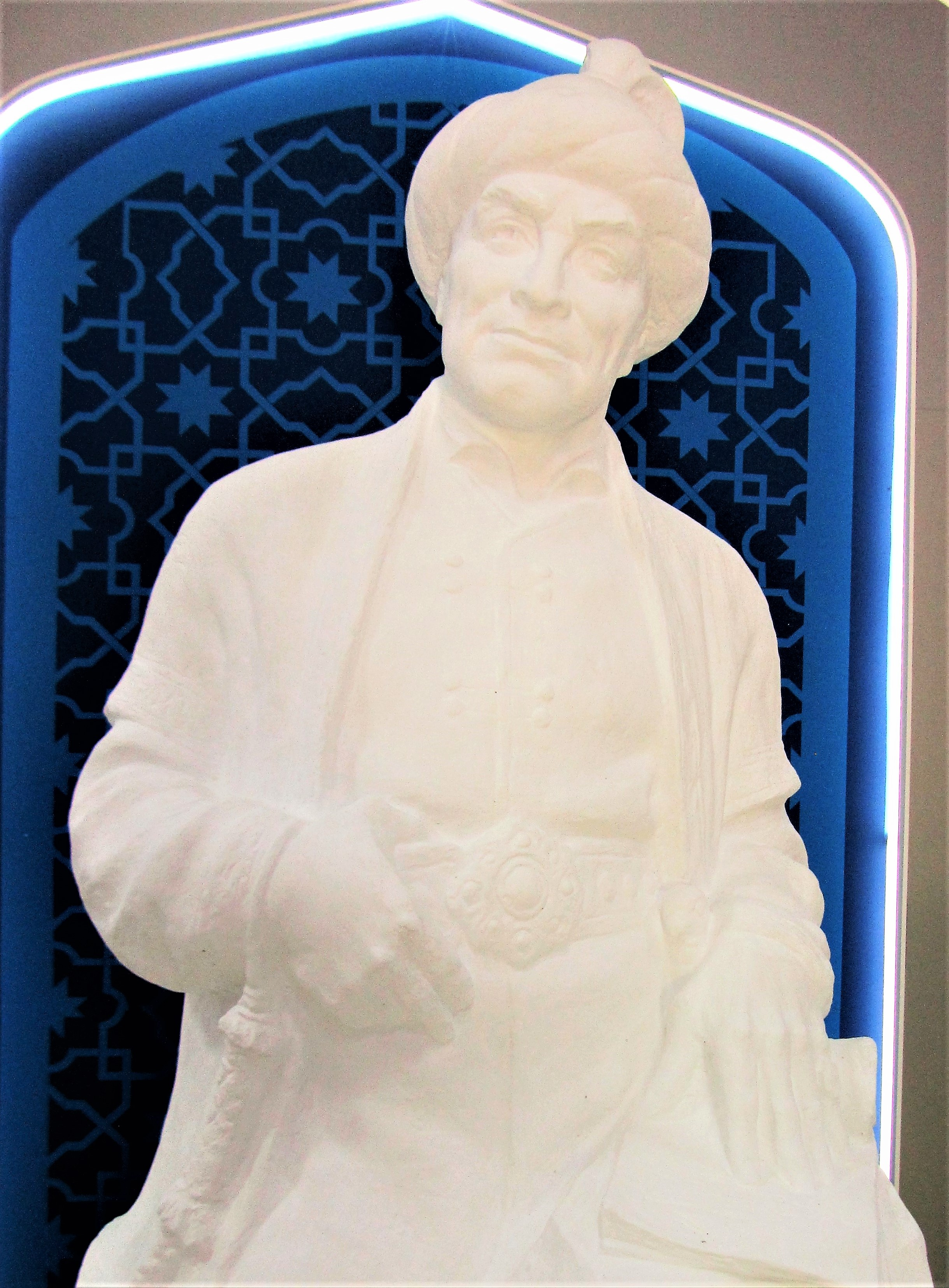 Татарча/tatarça: Викисәфәр Биләр 2